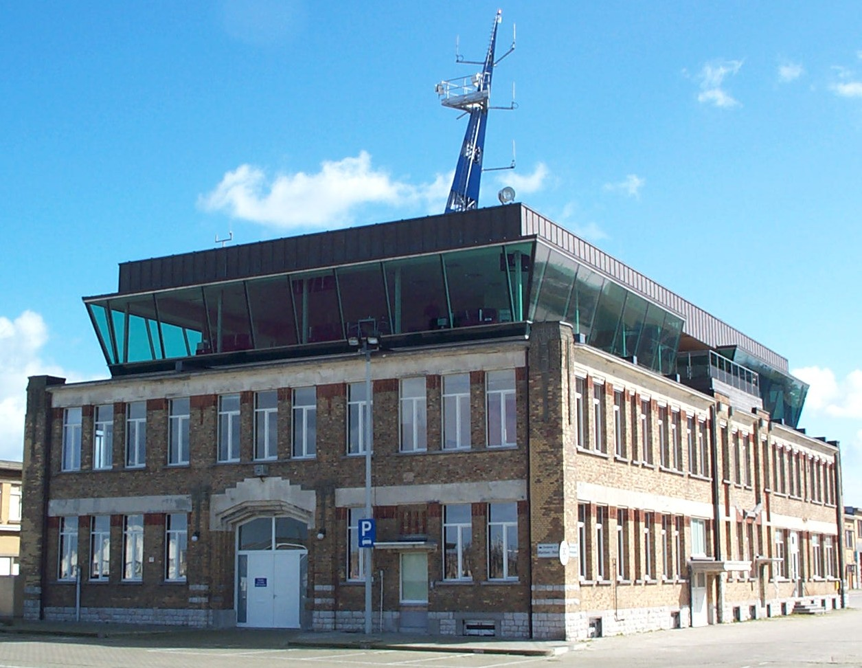 Het MRCC gebouw te Oostende. Officieel geopend op 12 juli 2006.